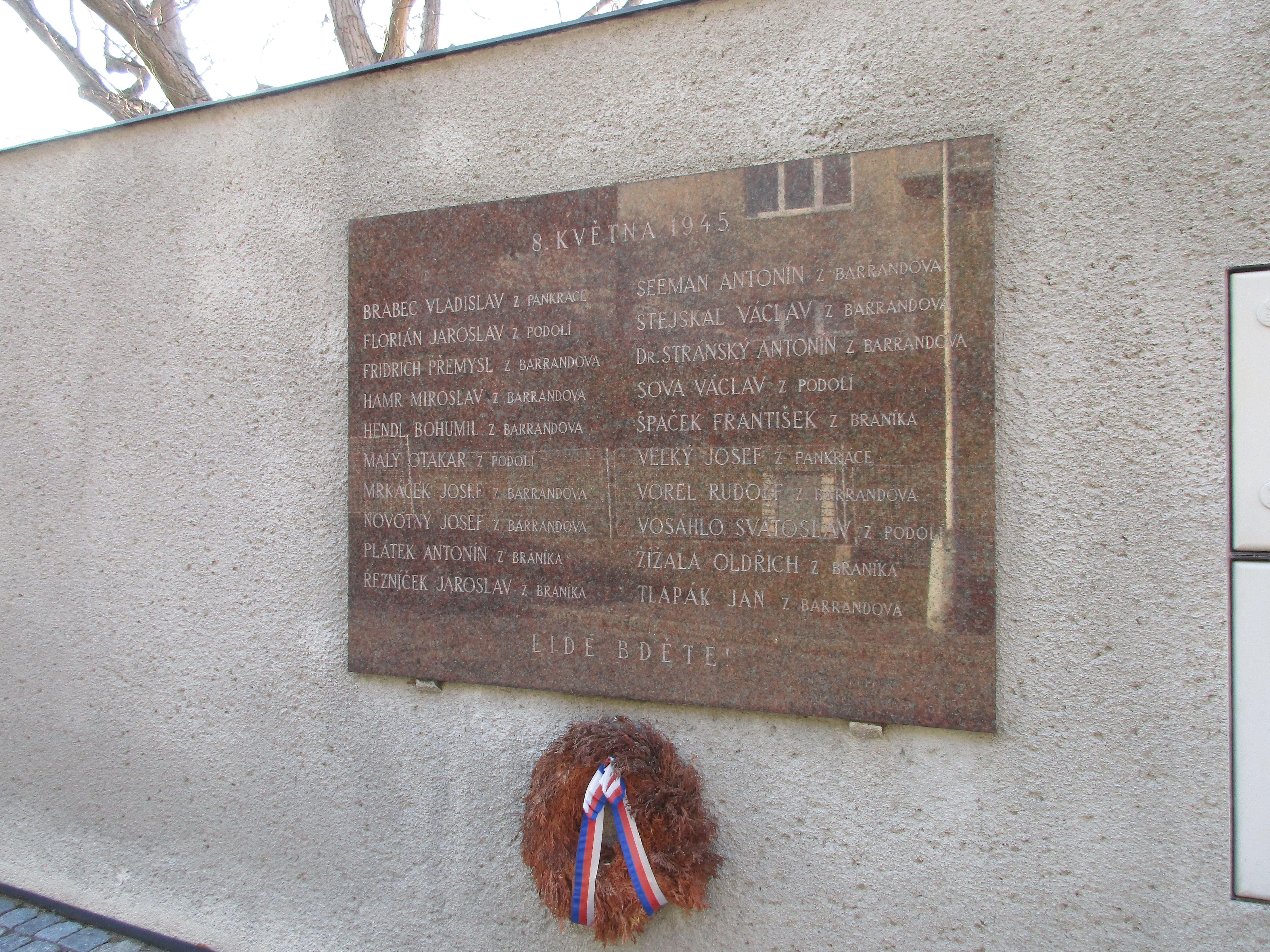 Kříž a pamětní deska se jmény obětí 2. světové války. Pod Habrovou, Praha 5-Hlubočepy.